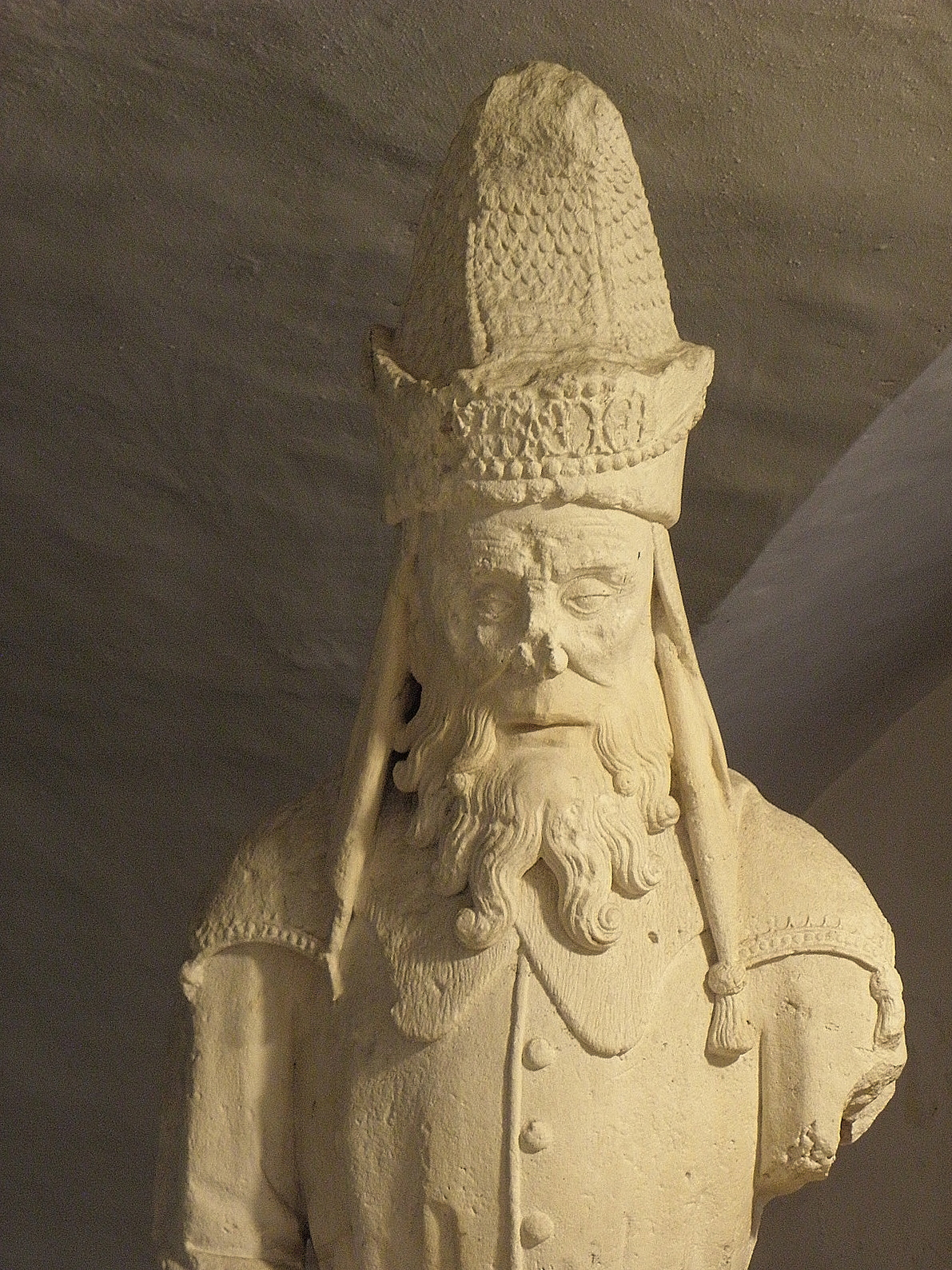 Gamaliel. Détail de la mise au tombeau de l'abbatiale Sainte-Croix de Quimperlé (29).